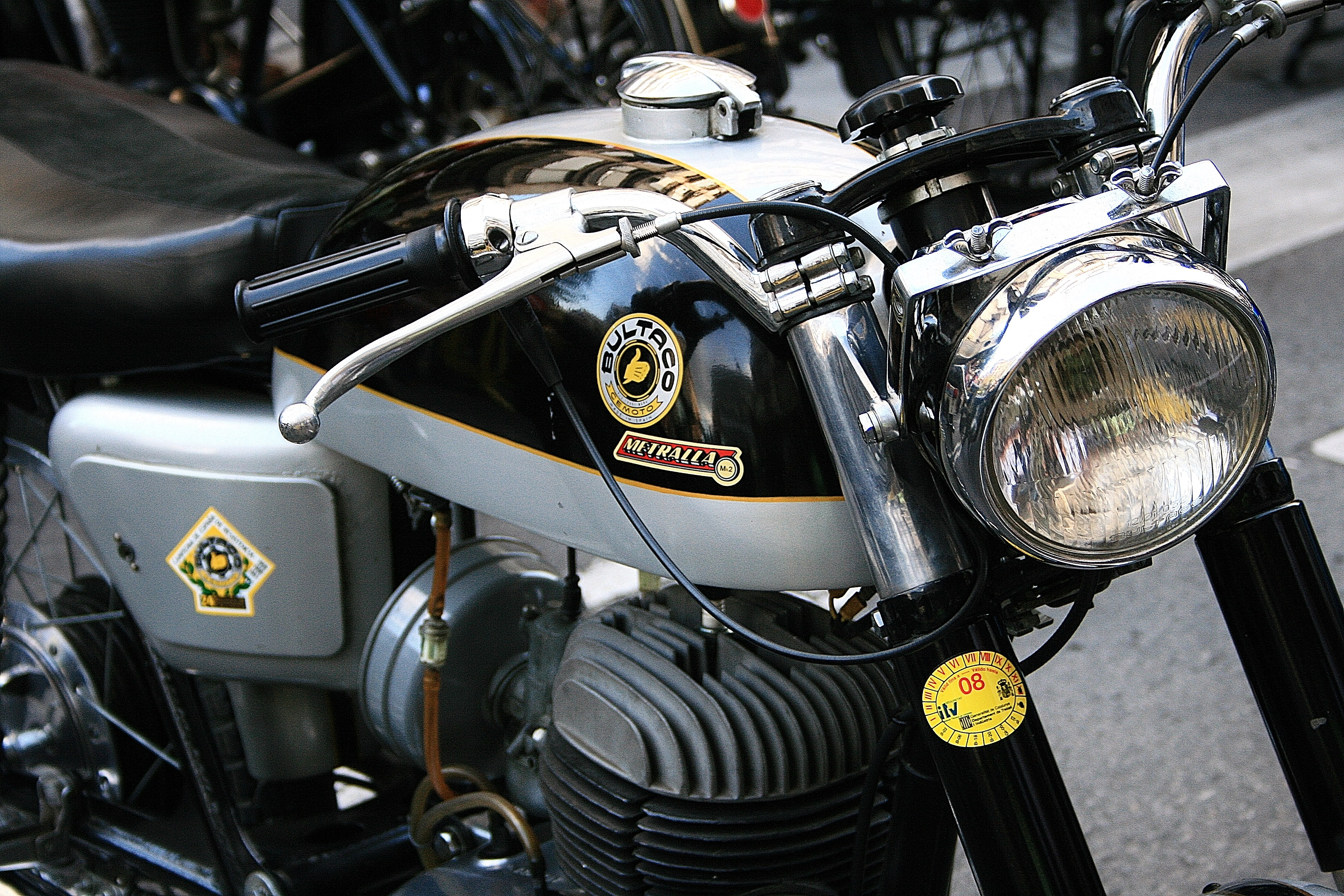 Bultaco Metralla Mk2 (1967 - 1974)